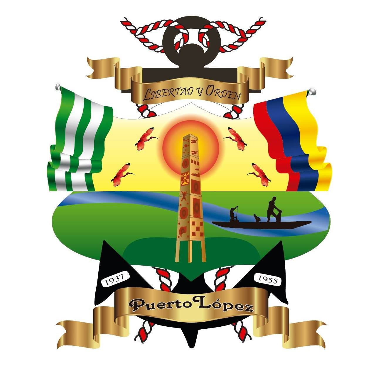 Escudo de Puerto Lopez meta totalmente restaurado